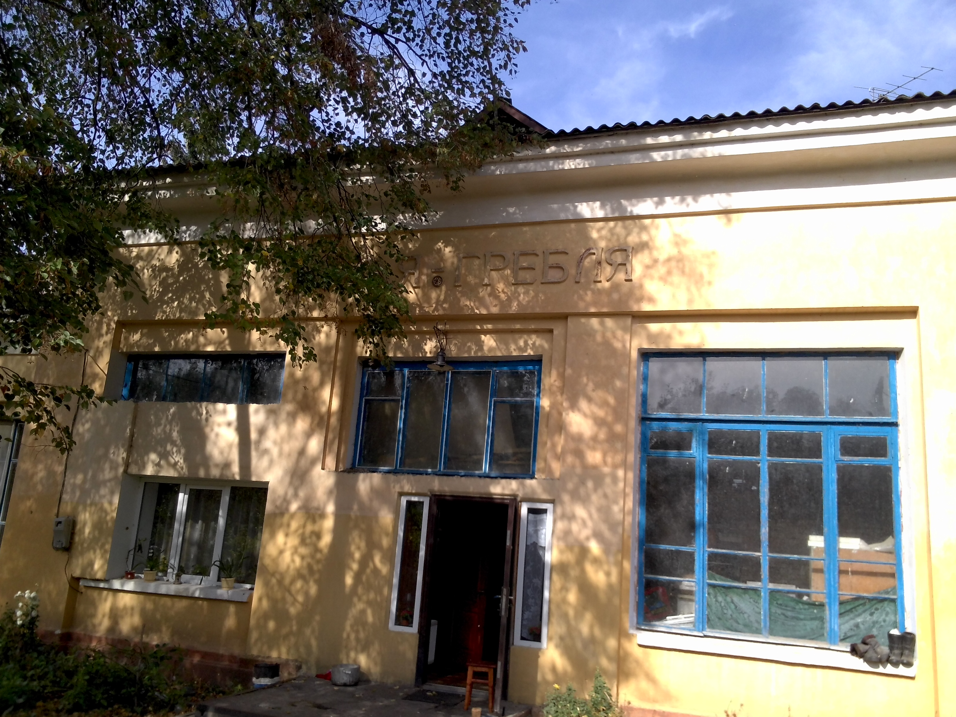 ст. Нова Гребля